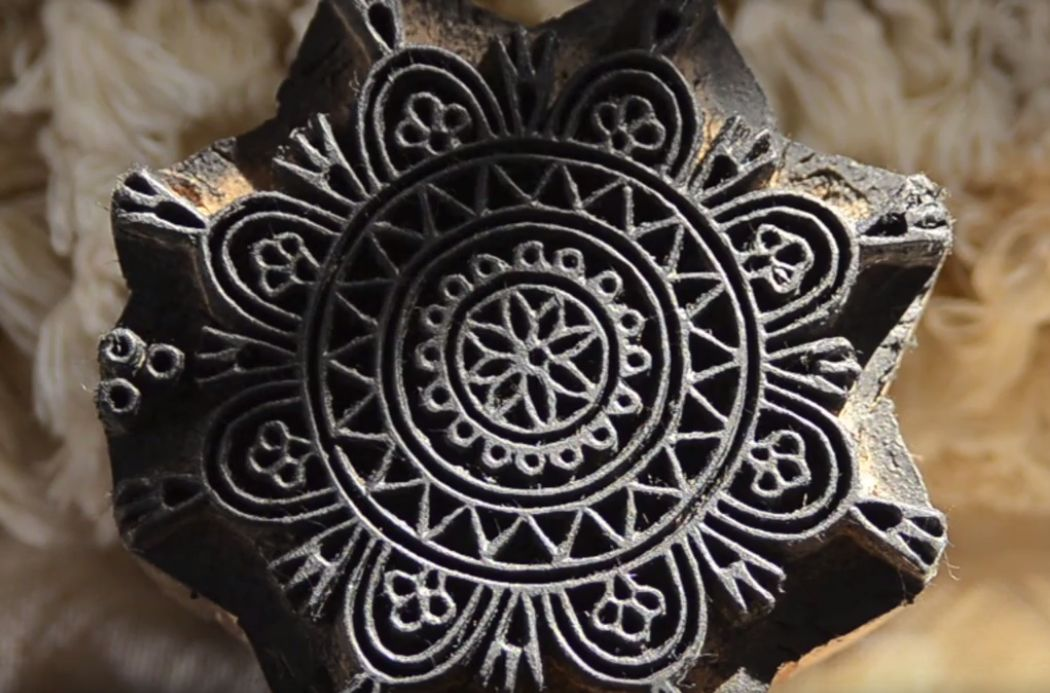 Дървен печат за декориране на тъкани от Нишапур